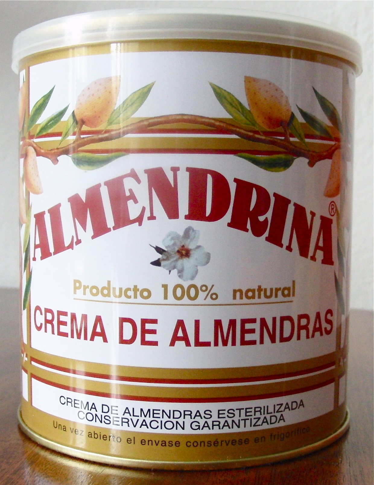 Mandel Creme für Nachtische, Eis, etc.